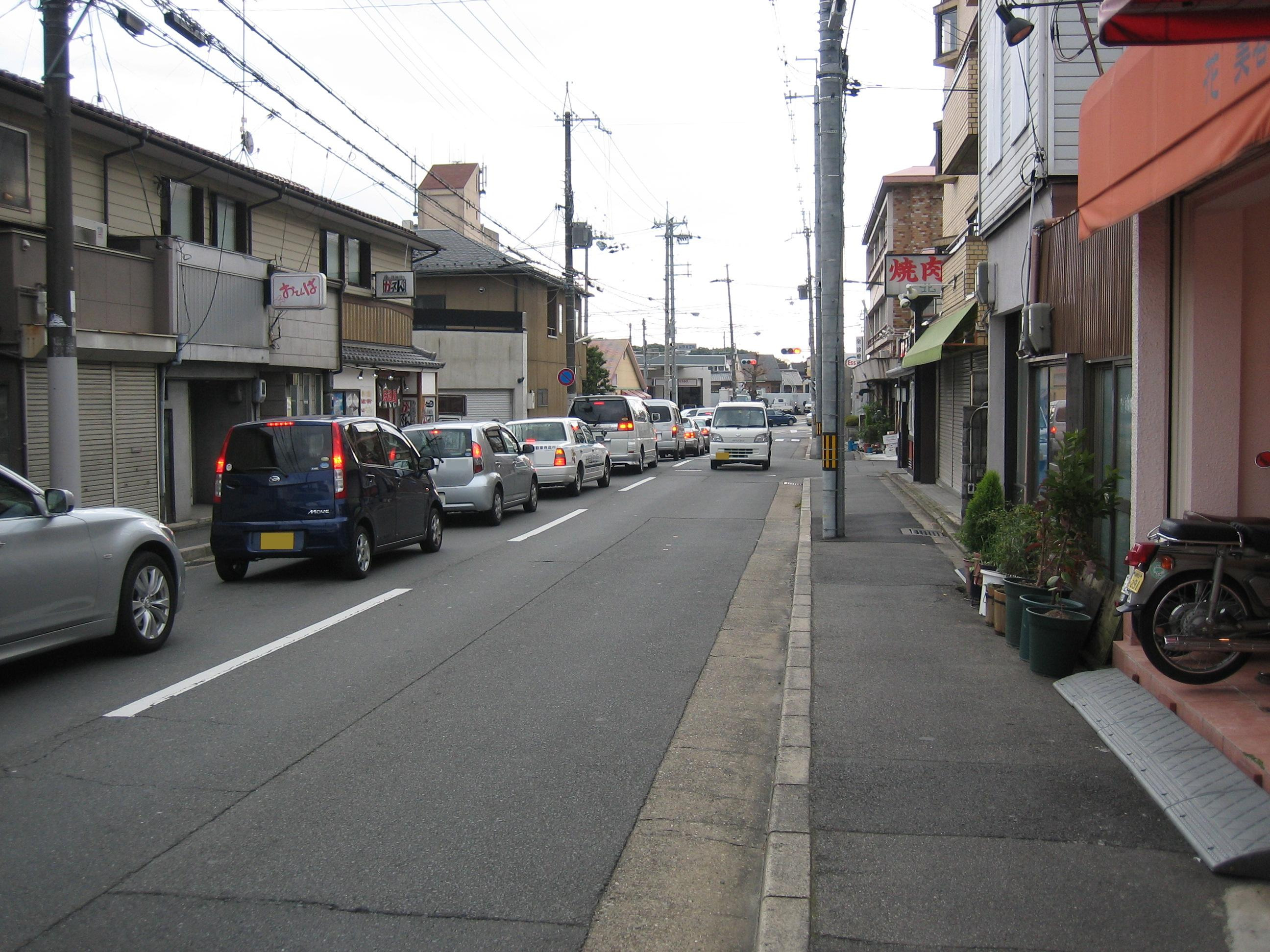 紫竹西通を京都市北区紫竹西野山町から撮影